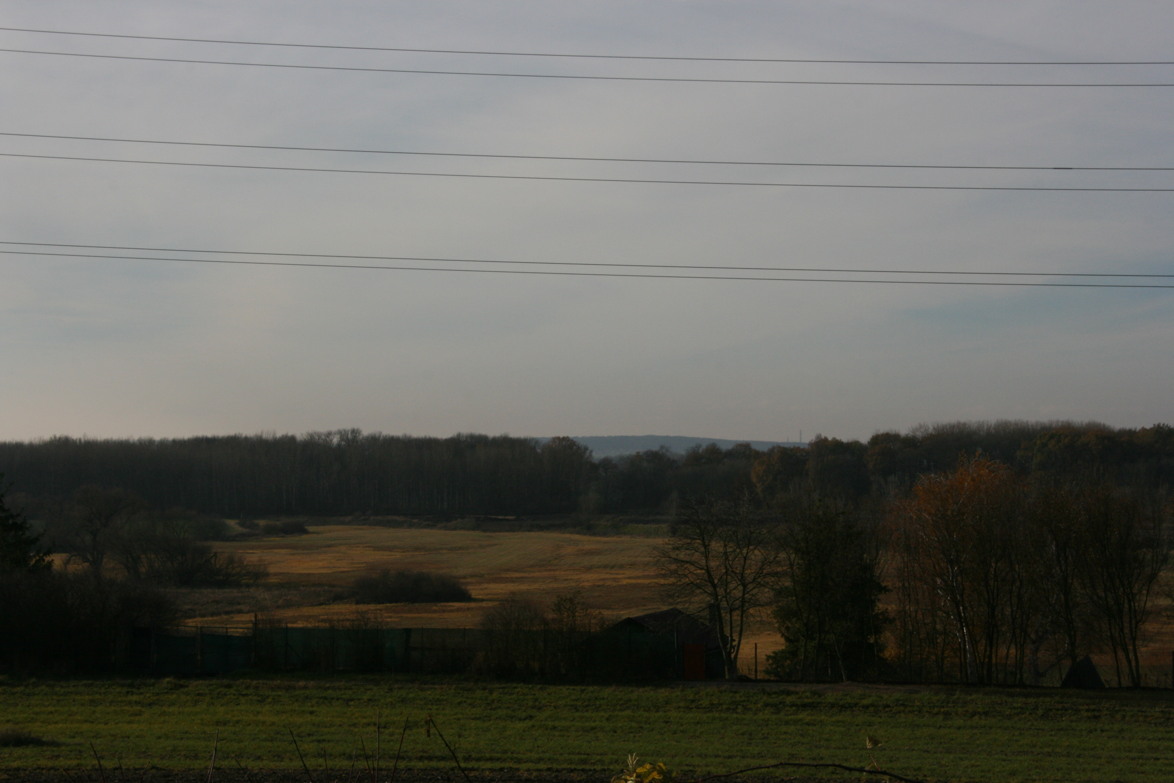 Pohled na Kelštice